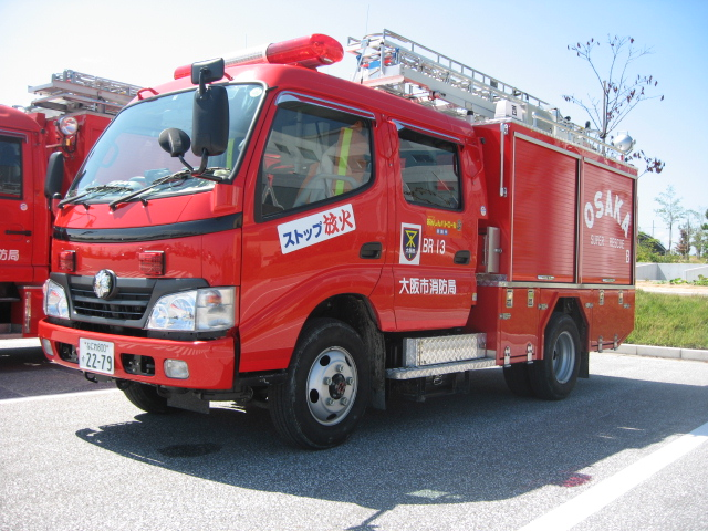 大阪市消防局西消防署Ⅳ型救助工作車